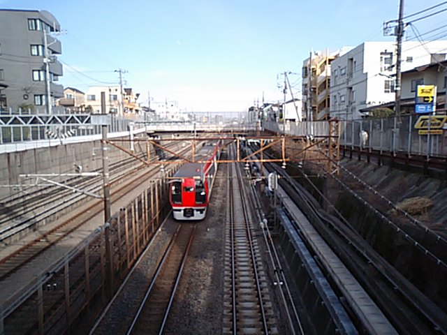 JR East Hinkaku Line (Ota,Tokyo,Japan) ,near Tokyu Ontakesan station. （品鶴線御嶽山駅付近）